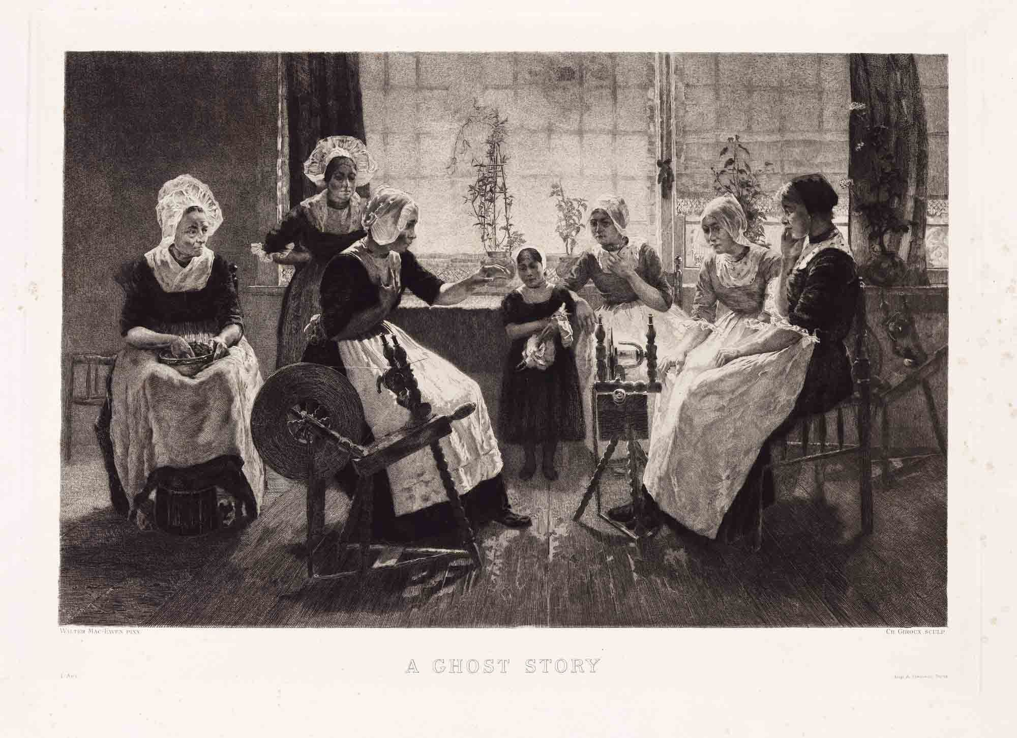 Eau-forte. A Ghost Story d'après Walter Mac-Evant. 39x55cm (cuvette) ; 63x90 (feuille). Fin XIXe.